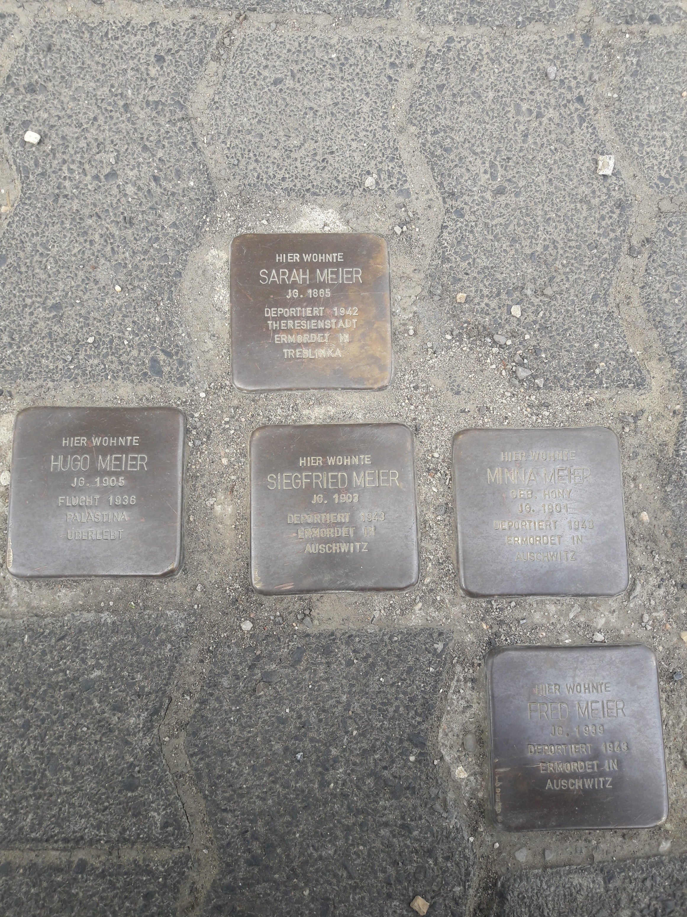 Stolpersteine Hagenerstraße 393, Kreuztal-Littfeld